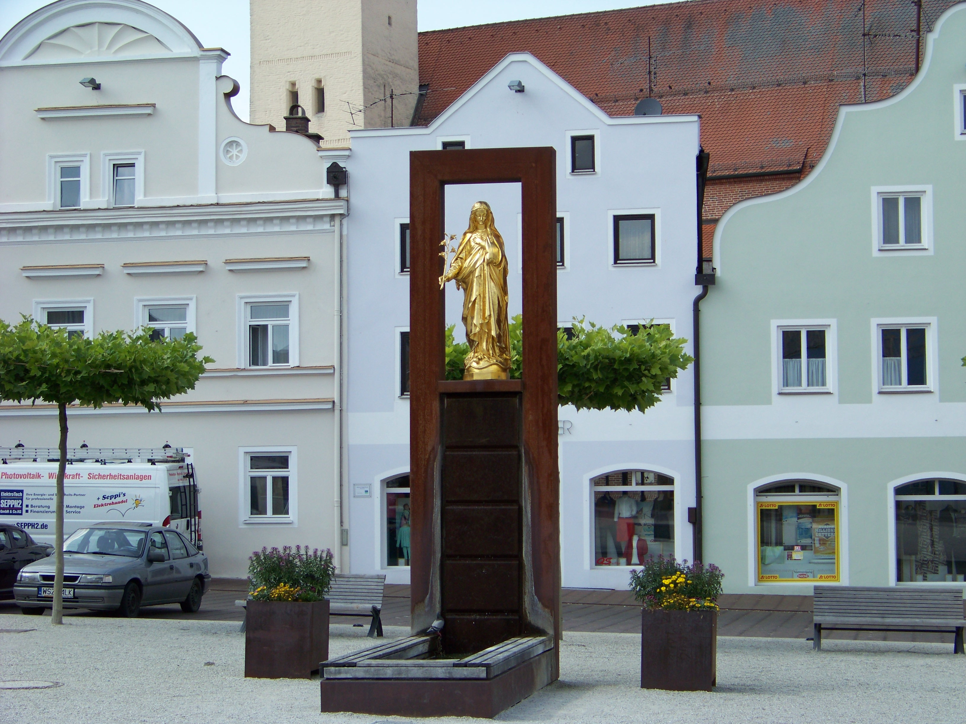 Frontenhausen, Marienplatz, Mariensäule. Marienfigur auf dem 19. Jahrhundert auf moderner Steinsäule.